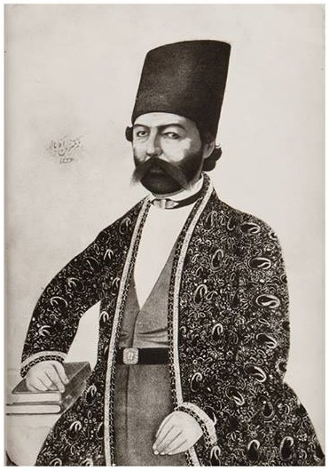 ملک قاسم میرزا برادر تنی ملک منصور میرزا بیست و ششمین پسر فتحعلی شاه بود.